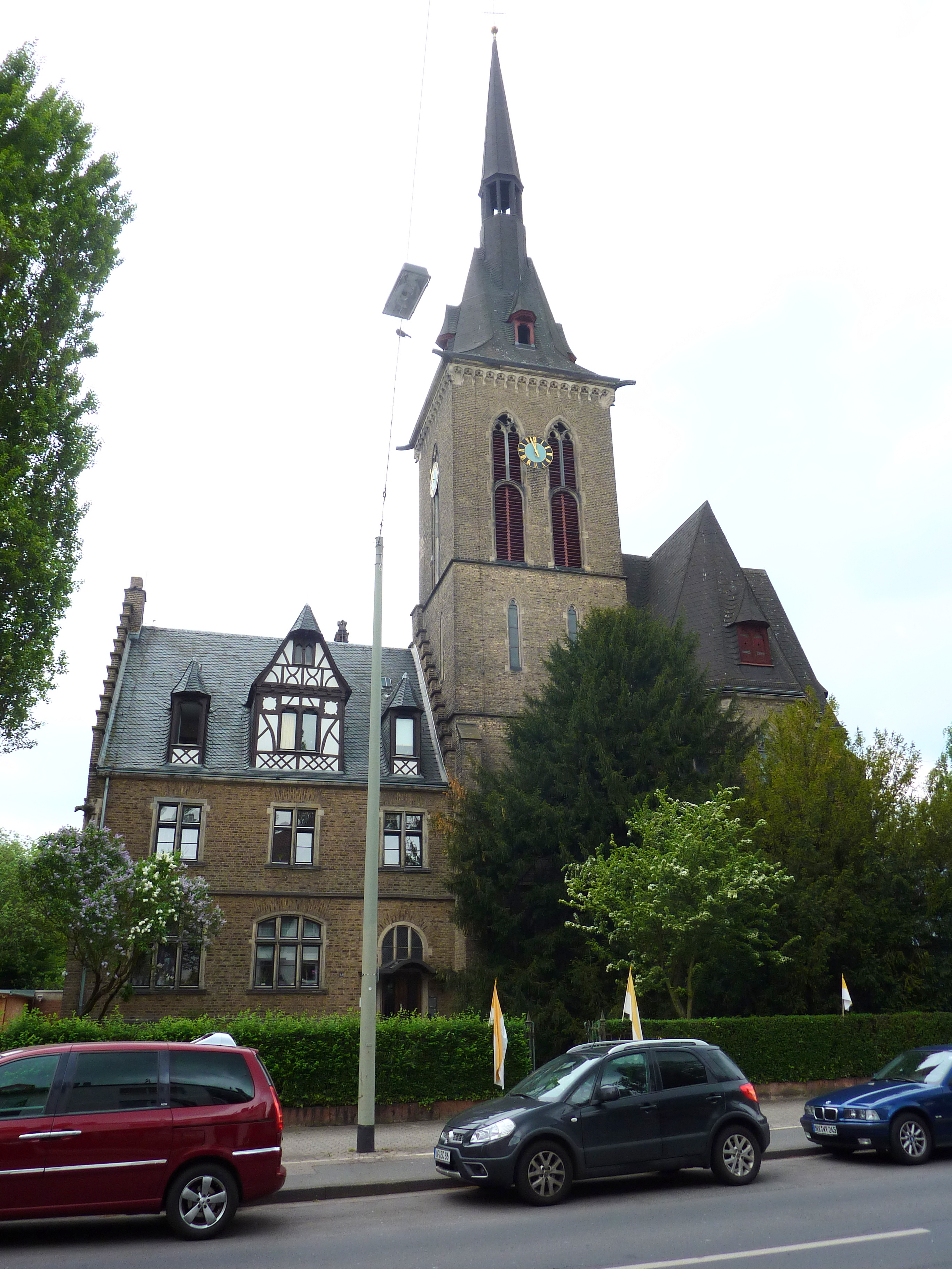 Die katholische Herz-Jesu-Kirche im Stadtteil Fechenheim in Frankfurt am Main. Totalansicht mit Pfarrhaus (links), von Osten gesehen